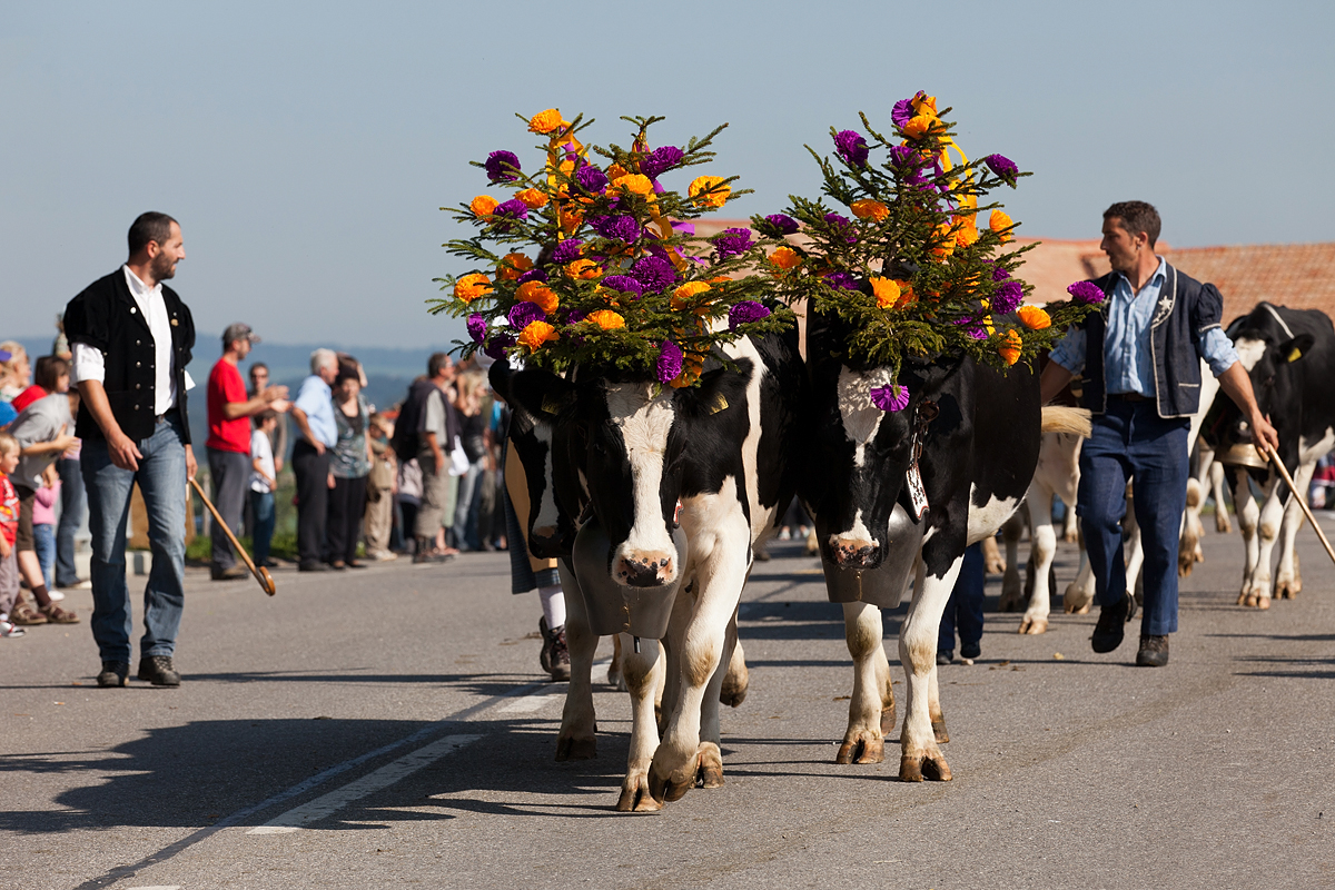 Désalpes de Semsales (FR) - Alpabzug